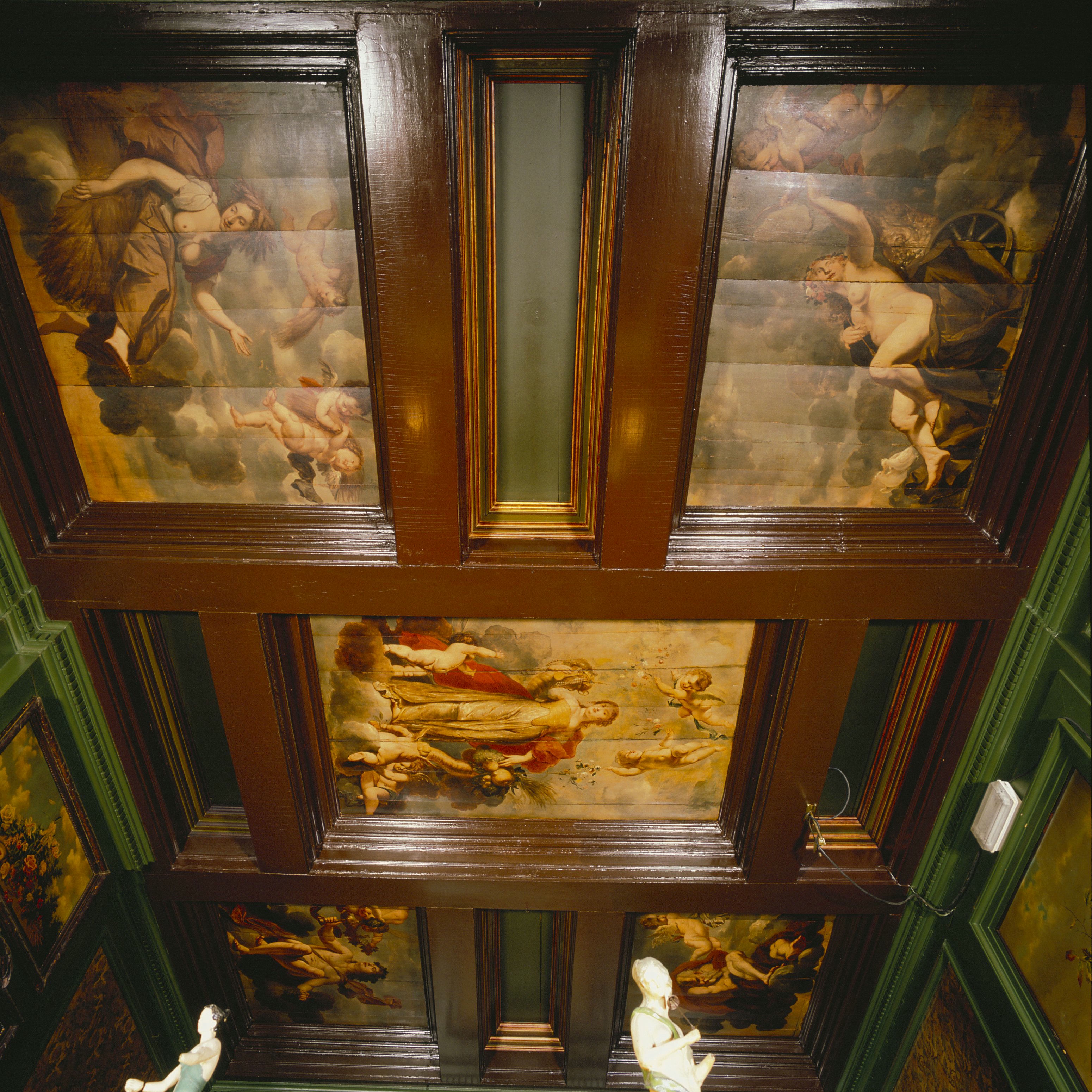 Plafondschildering/ Schildering: Interieur, begane grond, voorzijde links (Bar), plafondschildering, Vijfdelige plafondschildering met de personificatie van Overvloed omgeven door de vier seizoenen (opmerking: Inventarisatie Decoratieve Interieurschilderingen in Nederland (1600-1940), i.s.m. RKD)